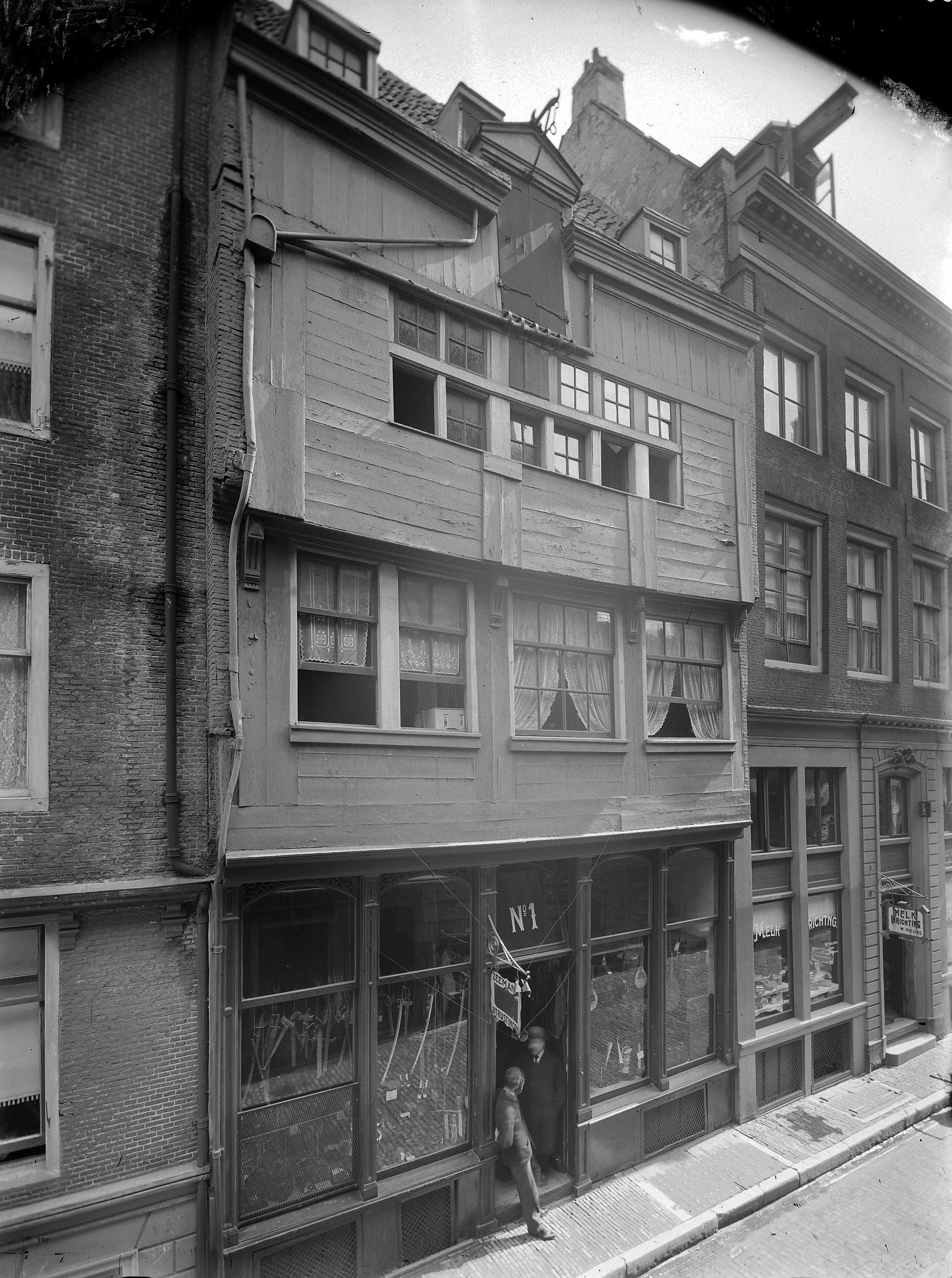 'HET AEPGEN': Overzicht voorgevel (opmerking: In: Buiten ; 14(1920), nr. 19, p. 228)